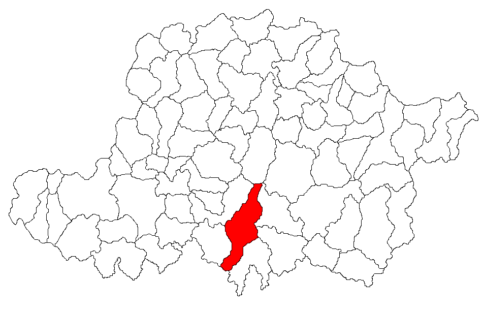 Categorie:Hărţi ale judeţului Arad